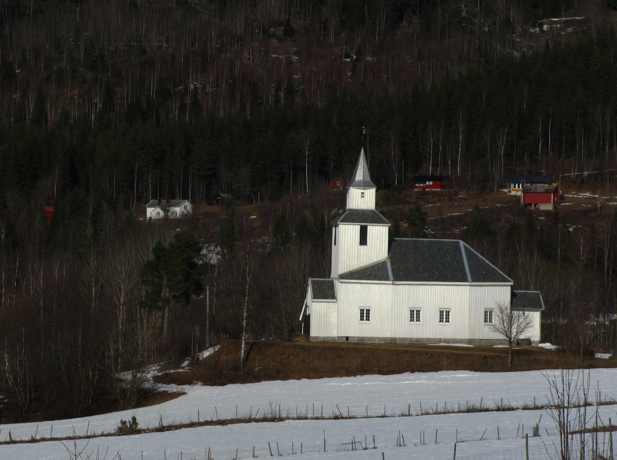 Sandnes kyrkje i Åraksbø, Bygland kommune. Byggeår 1844.